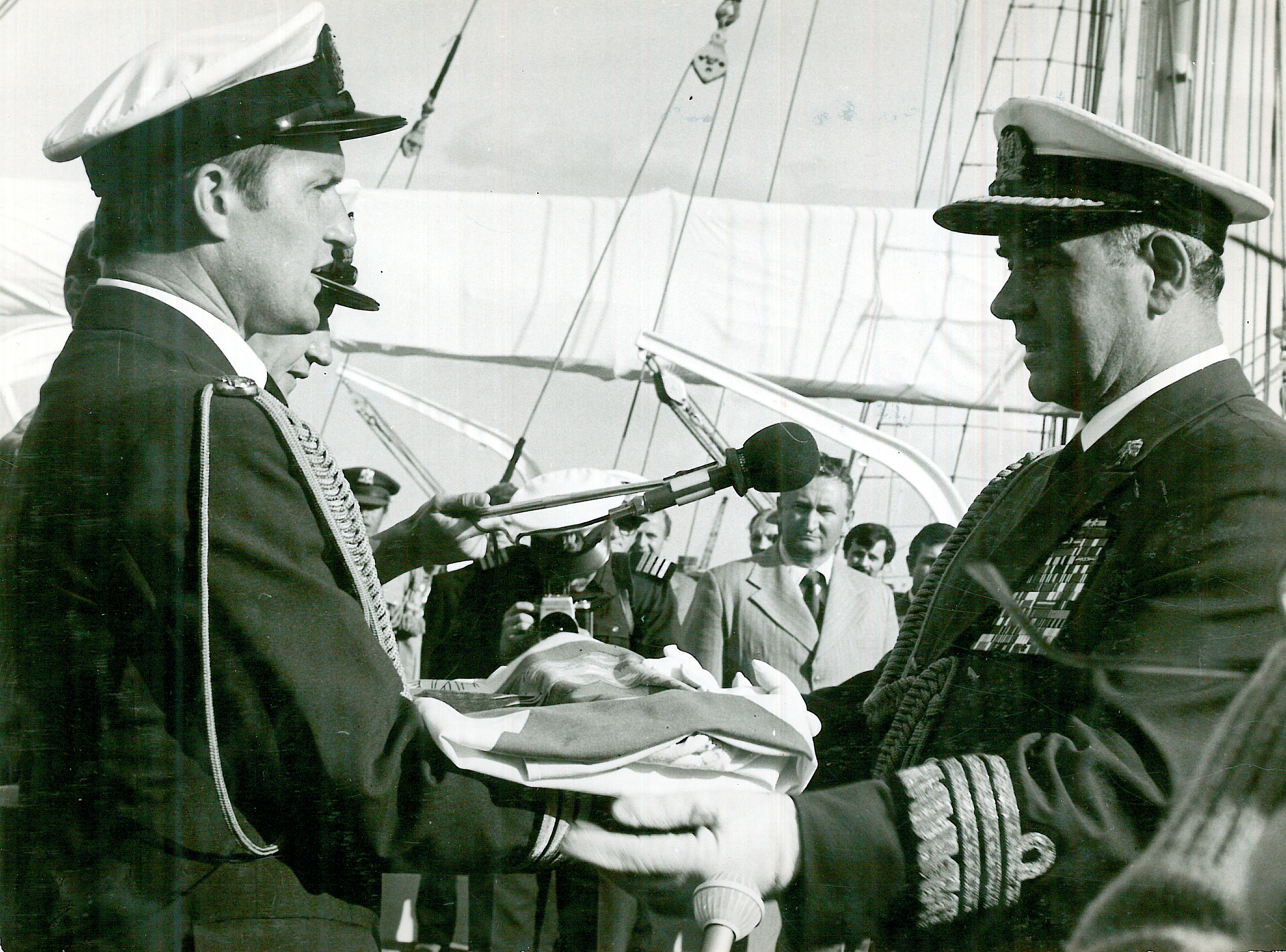 11 sierpnia 1982r.Admirał Ludwik Janczyszyn wręcza proporzec Marynarki Wojennej dla z.d.o por. mar. Czesława Dyrcza.